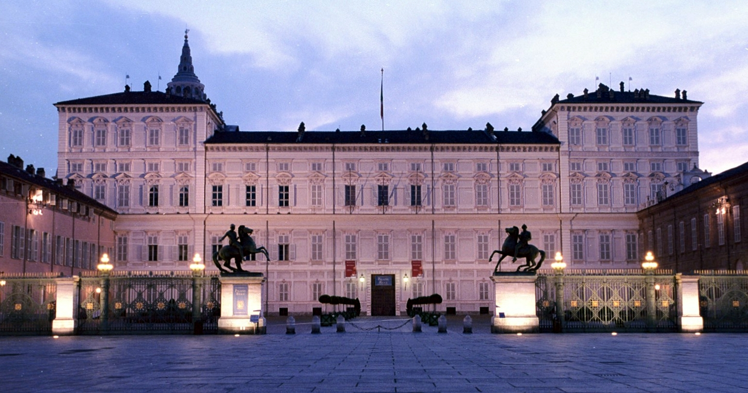 Palazzo Reale